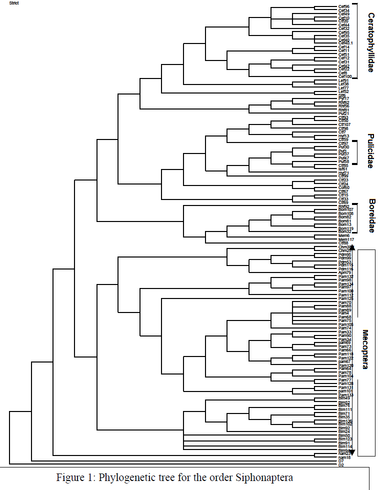 The Fleas Family Three, February 19 of 2014 Alison Swindle and Dr. Michael F. Writing